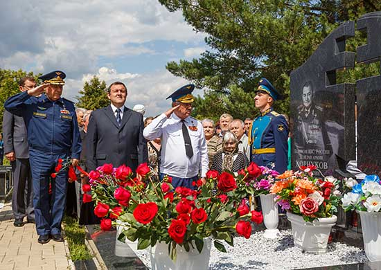 Открытие памятника бывшему главнокомандующему ВВС России Анатолию Корнукову на Троекуровском кладбище